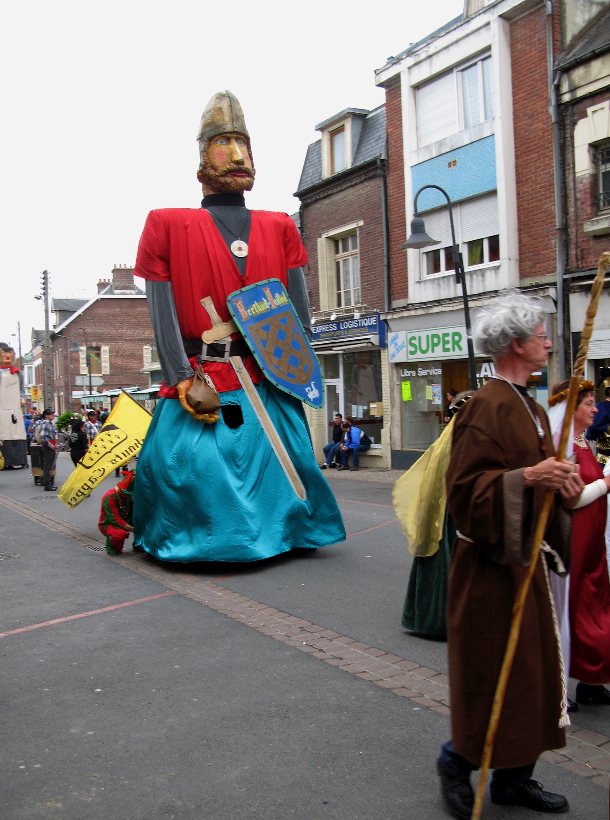 Ham (Somme, France) - Animation festive au centre-ville, un dimanche de printemps. Le géant Berthoult, dans la rue de Noyon. .